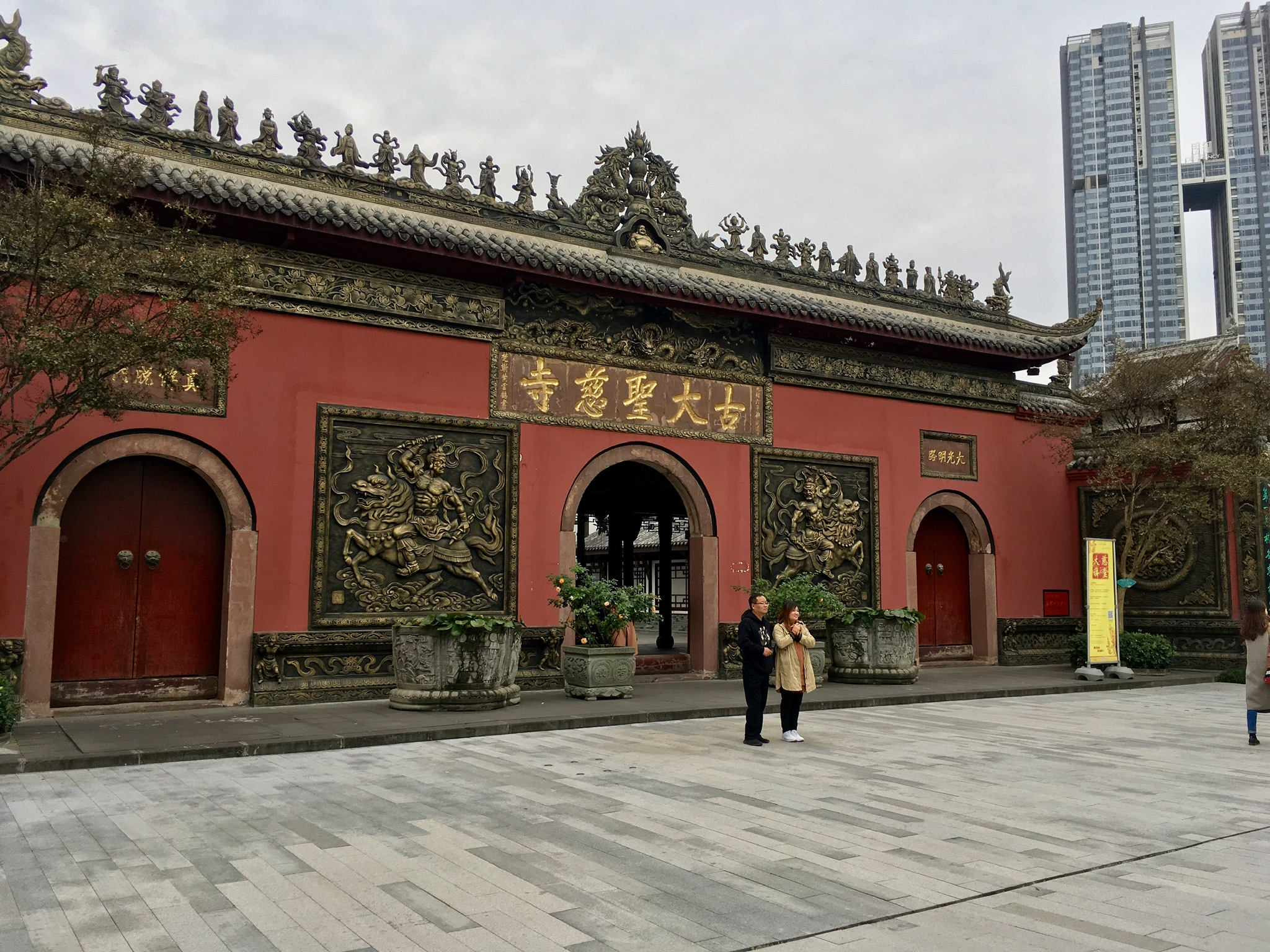 成都古圣大慈寺太古里一侧大门